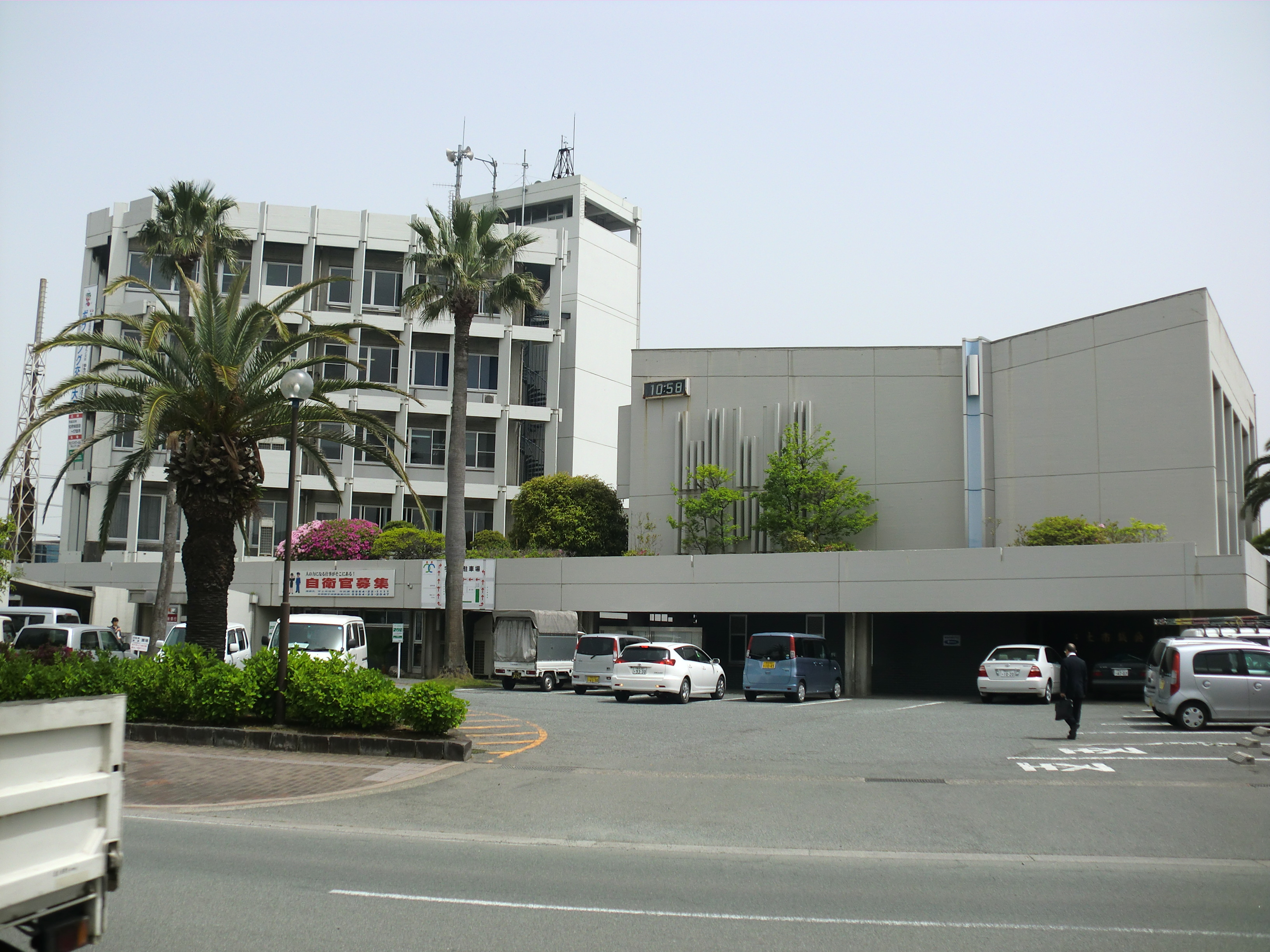 熊本県宇土市にある宇土（うと）市役所